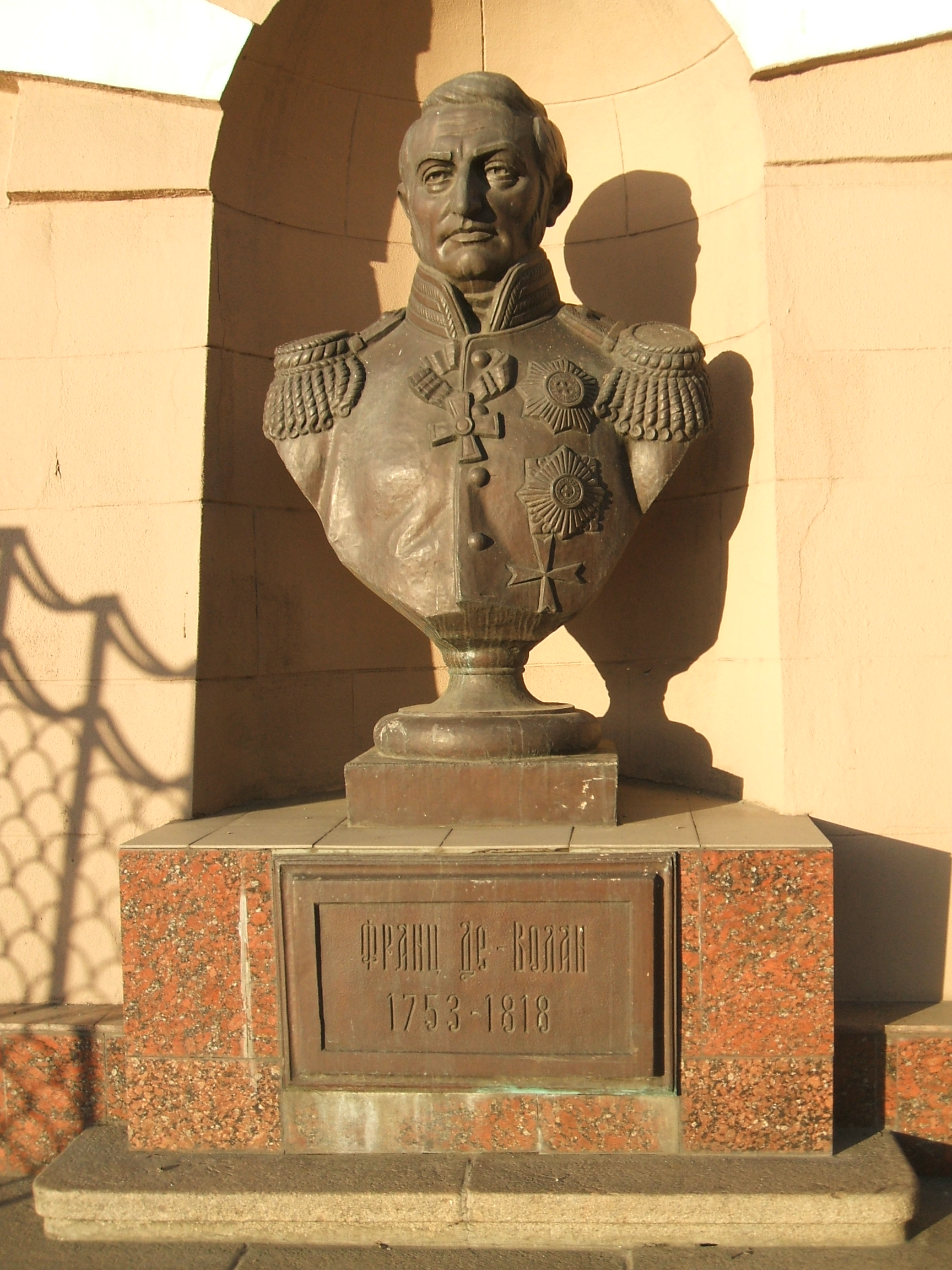 Franz de Volán, bust in Odesa.